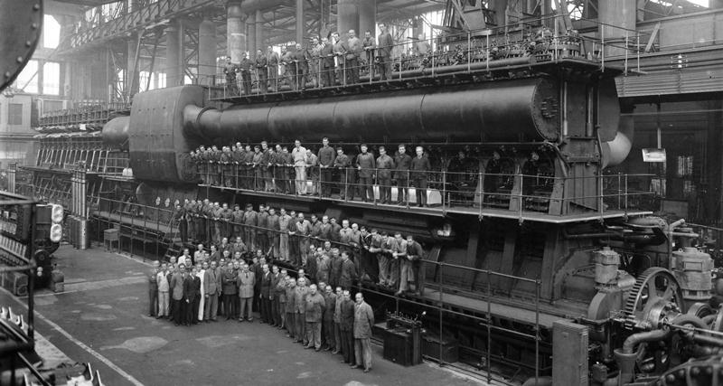 Fiat Grandi motori DL6512 -1941 circa - Centro Storico Fiat